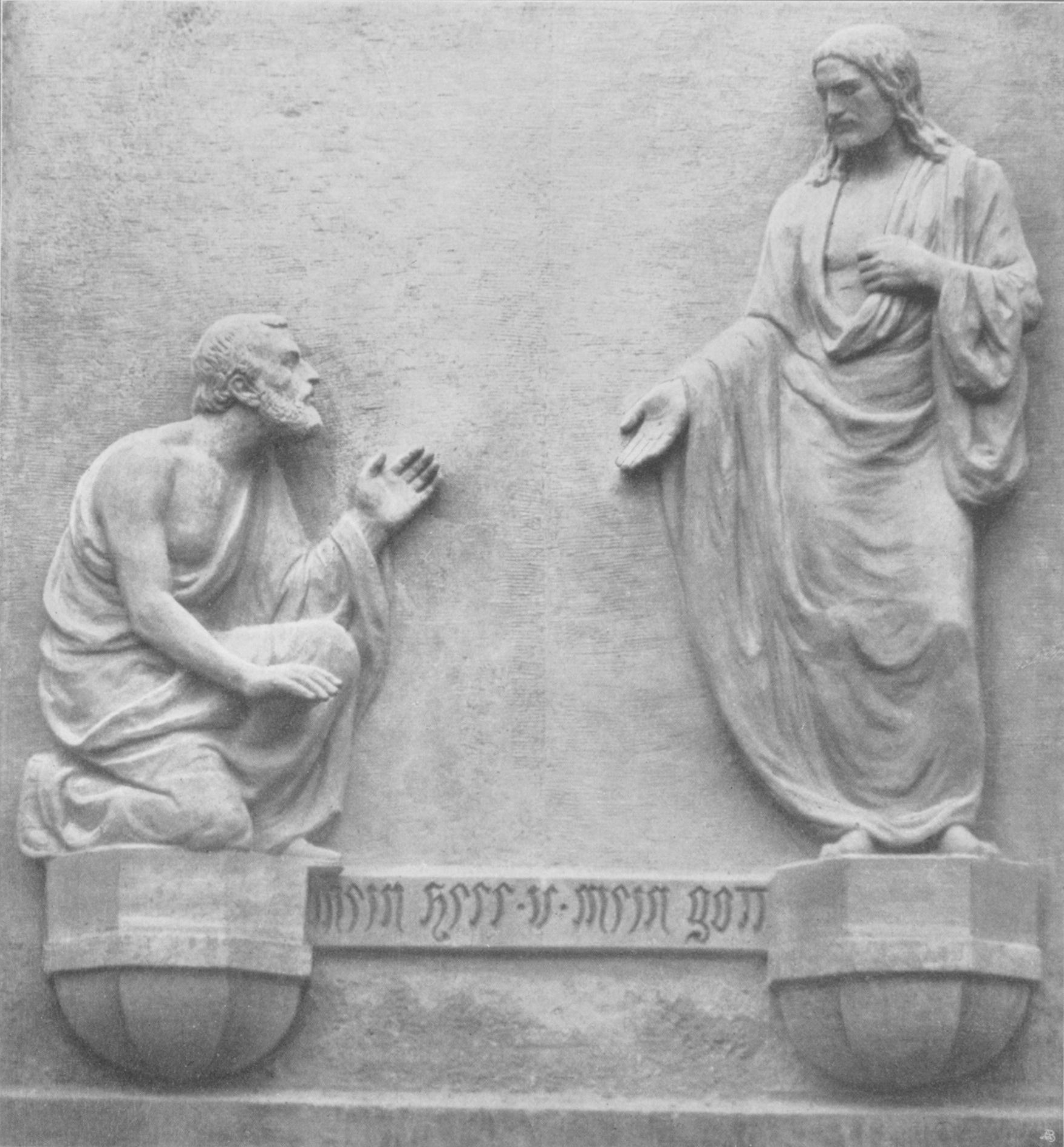 Außenrelief „Christus und Thomas“ von Hermann Lang (Bildhauer) an der Erlöserkirche (München), 1906.